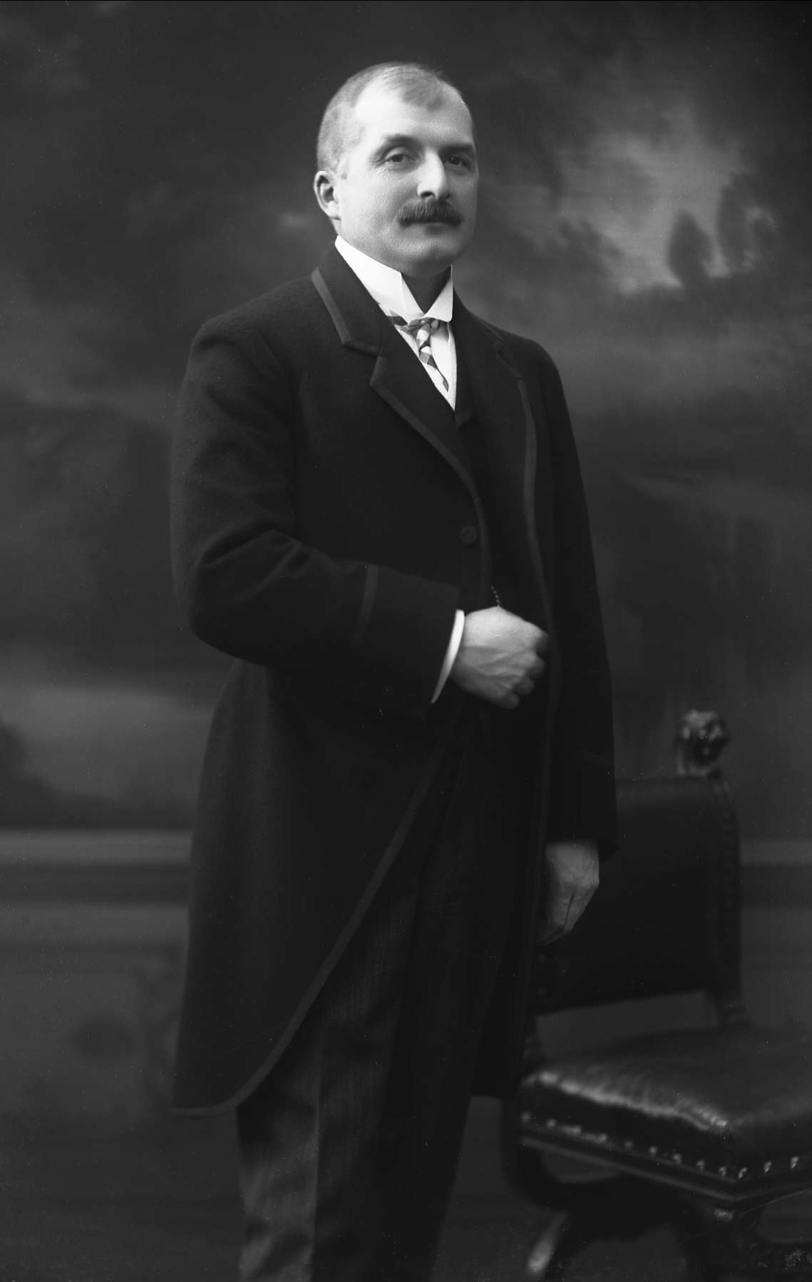 Harald Løvenskjold 1908